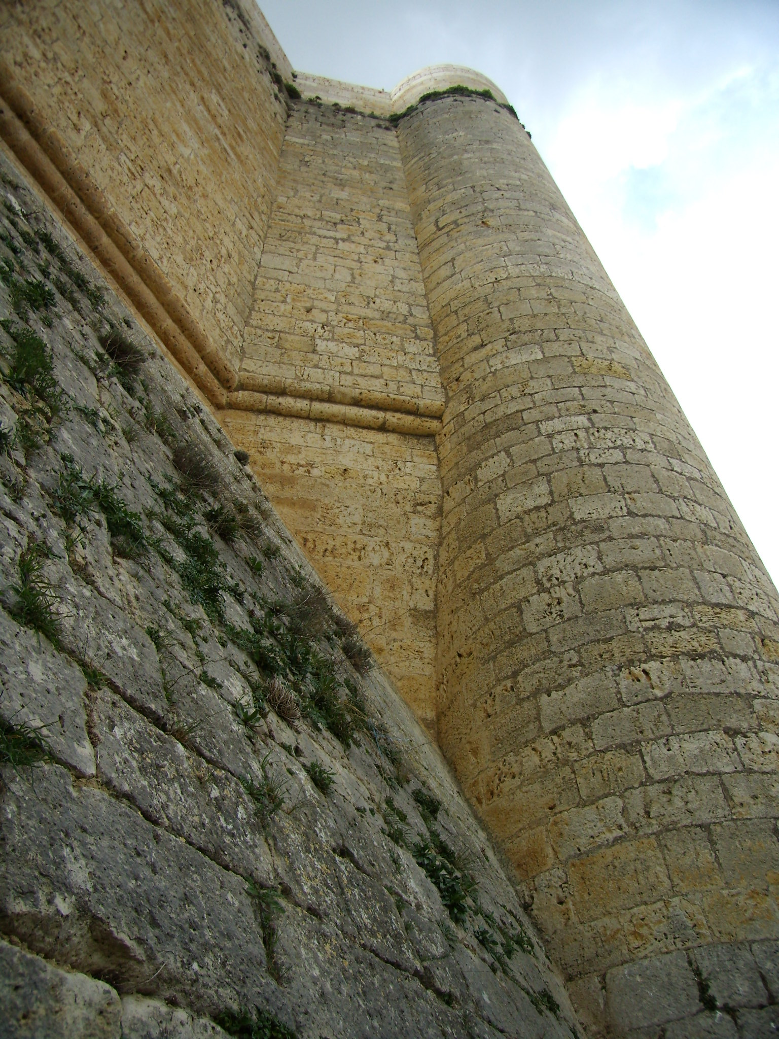 Castillo de Fuentes de Valdepero (Palencia, España).